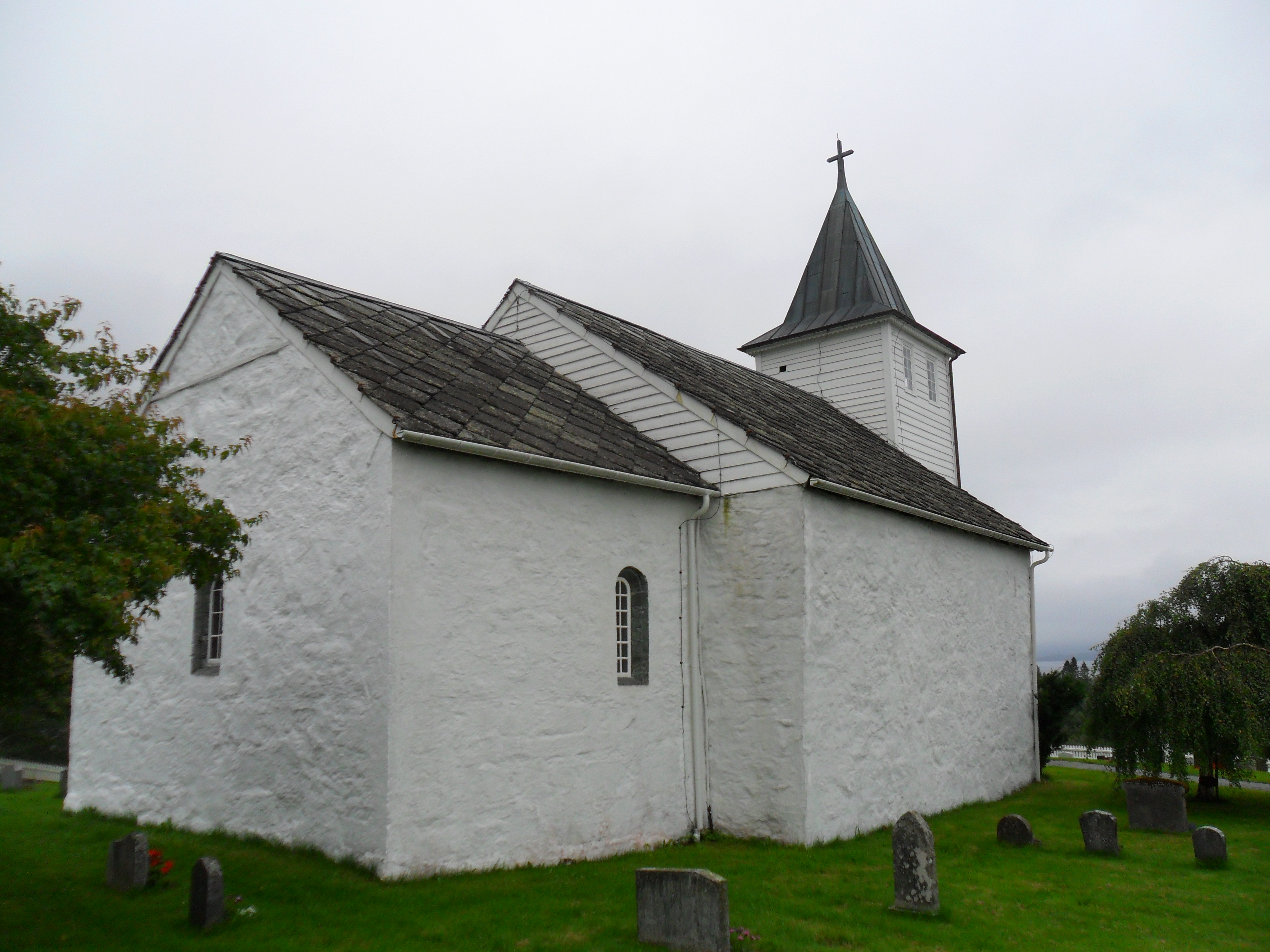 Ænes kirke i Fusa kommune, Hordaland.